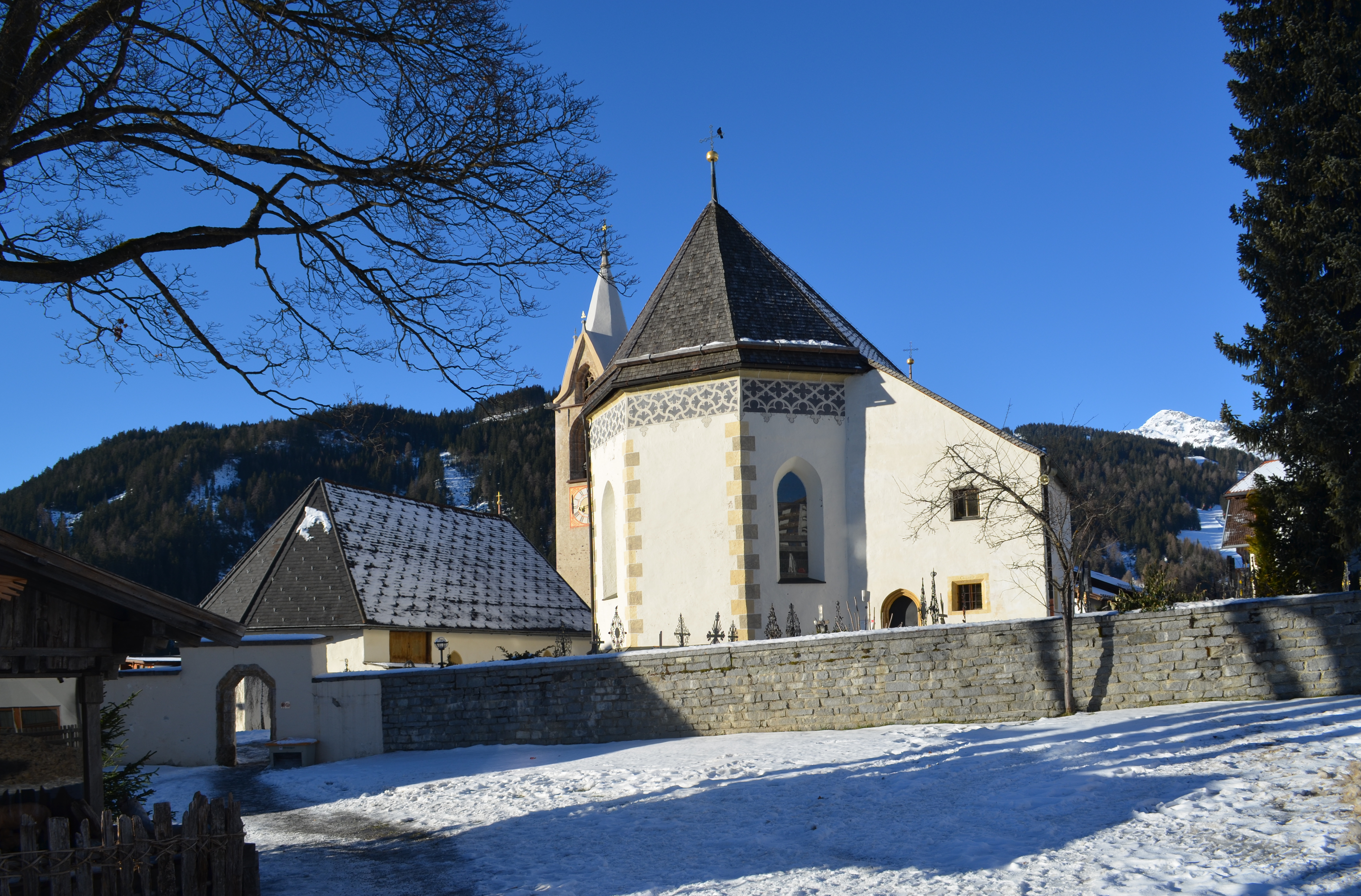 Serfaus, Kath. Pfarrkirche Maria Himmelfahrt